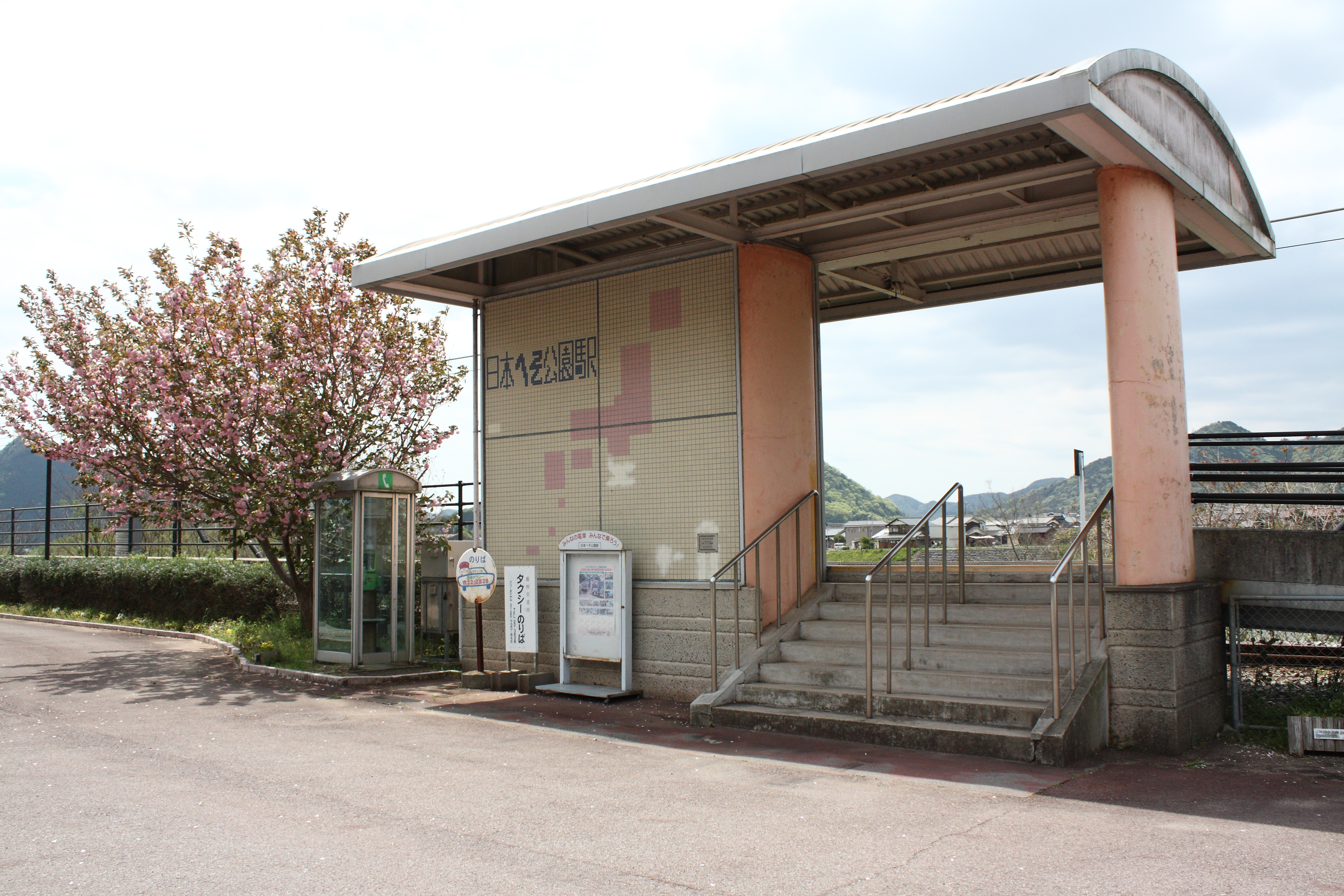 日本へそ公園駅（兵庫県西脇市） Canon EOS Kiss X2